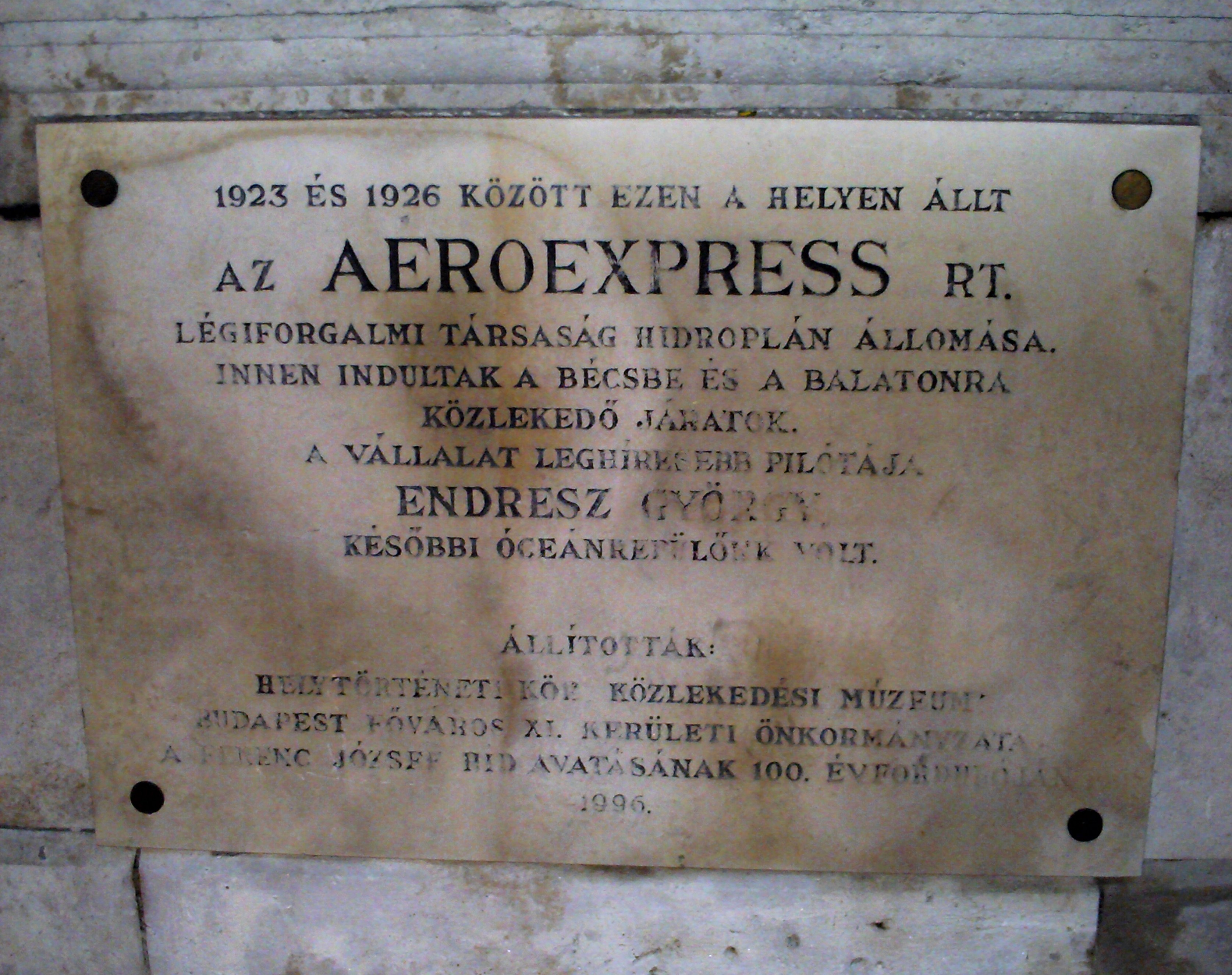 Az Aeroexpress Rt. emléktáblája a Szabadság-híd budai hídfőjénél (Budapest)